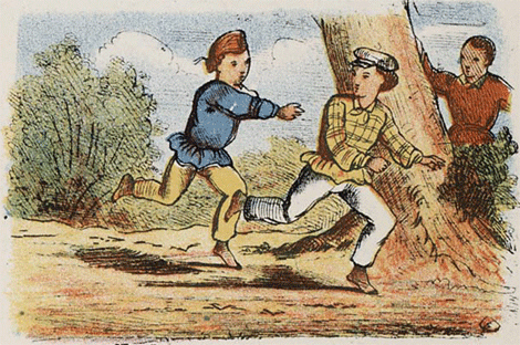 Krijgertje. Jongens, wie mij krijgen kan, Die, zeg ik, is een knappe man; Gij krijgt mij niet, o, neen, o, neen, Geen is als ik, zoo vlug ter been.